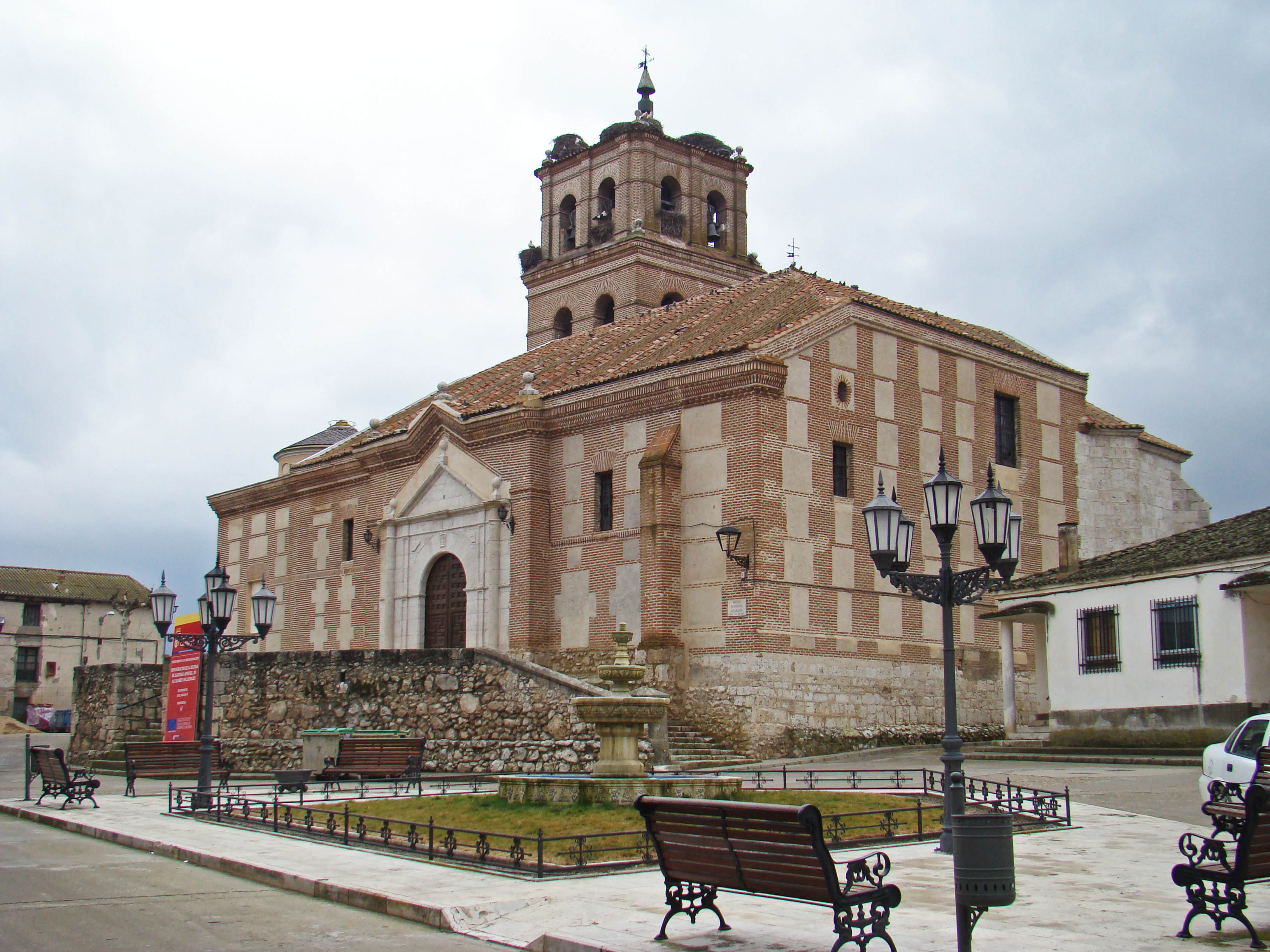 Alcazarén, provincia de Valladolid. Iglesia de Santiago.